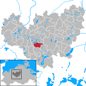 Mühl Rosin in Mecklenburg-Vorpommern - District Güstrow